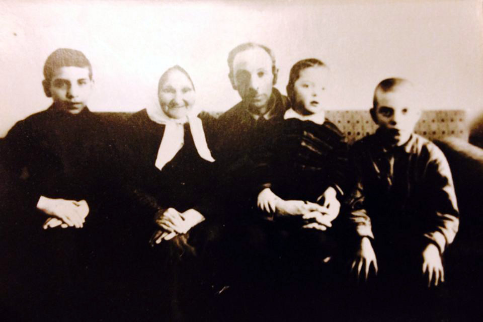 Григорий Семенович Мороз (1893-1937)